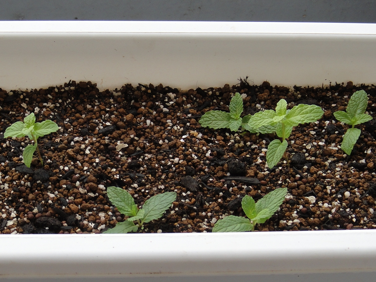 発根したばかりのスペアミントの刺し芽